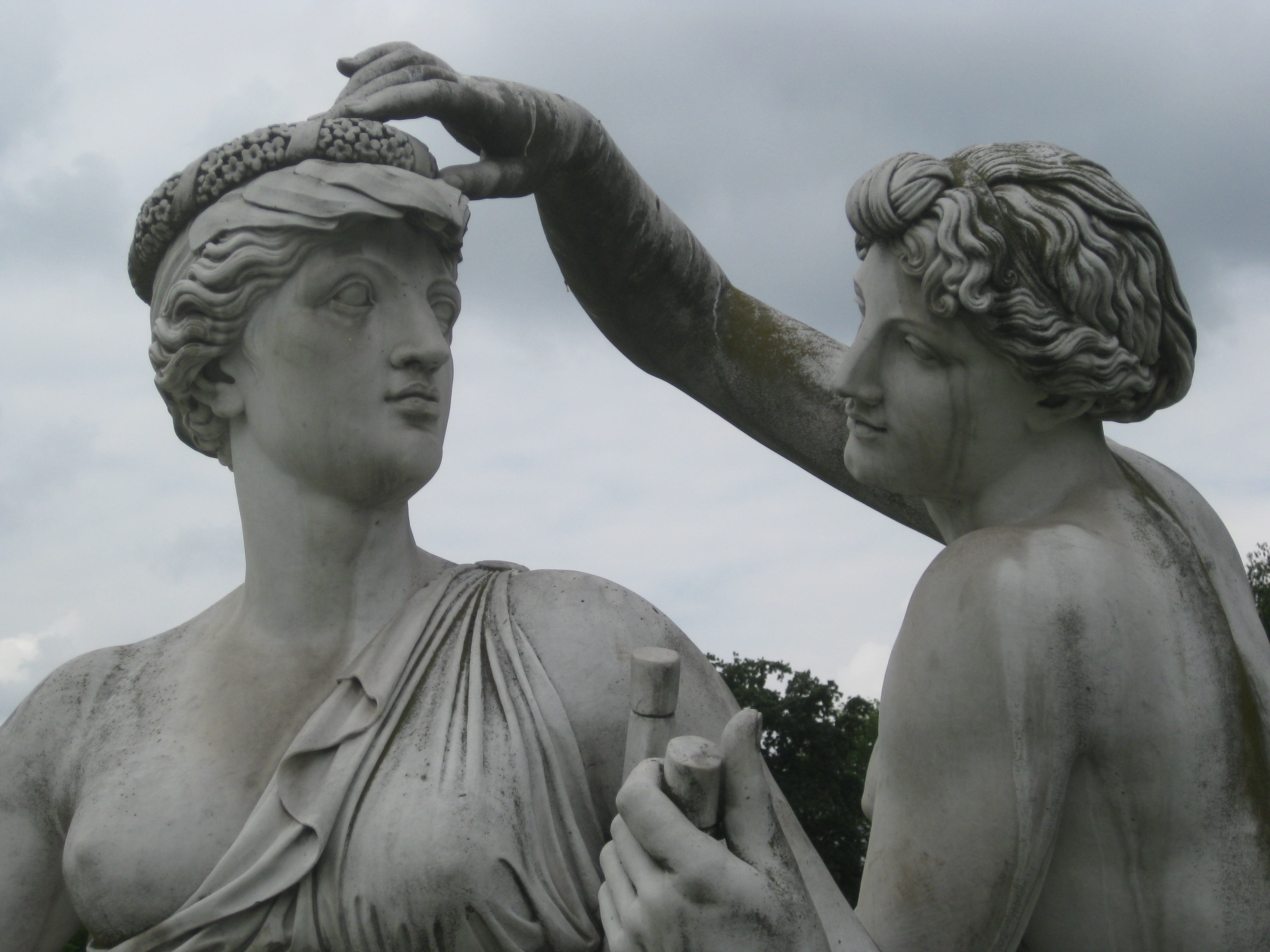 Johann Heinrich Dannecker: Wasser- und Wiesennymphe, Vorderseite, Ausschnitt. Kopie der Ausführung von Friedrich Distelbarth (1810-1815) in Carrara-Marmor von der Stuttgarter Bildhauerin Doris Schmauder (1982), Stuttgart, Schloß Rosenstein, am Bassin vor dem Haupteingang